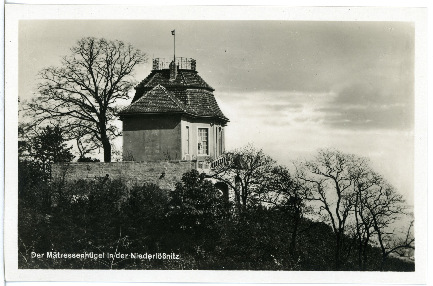 Radebeul; Der Mätressenhügel in der Niederlößnitz This postcard is from publisher Brück & Sohn in Meißen ( postcard has a unique number 24799 and is available in a higher resolution at the publisher. This images was uploaded in a cooperation project between Wikipedians and the publisher.